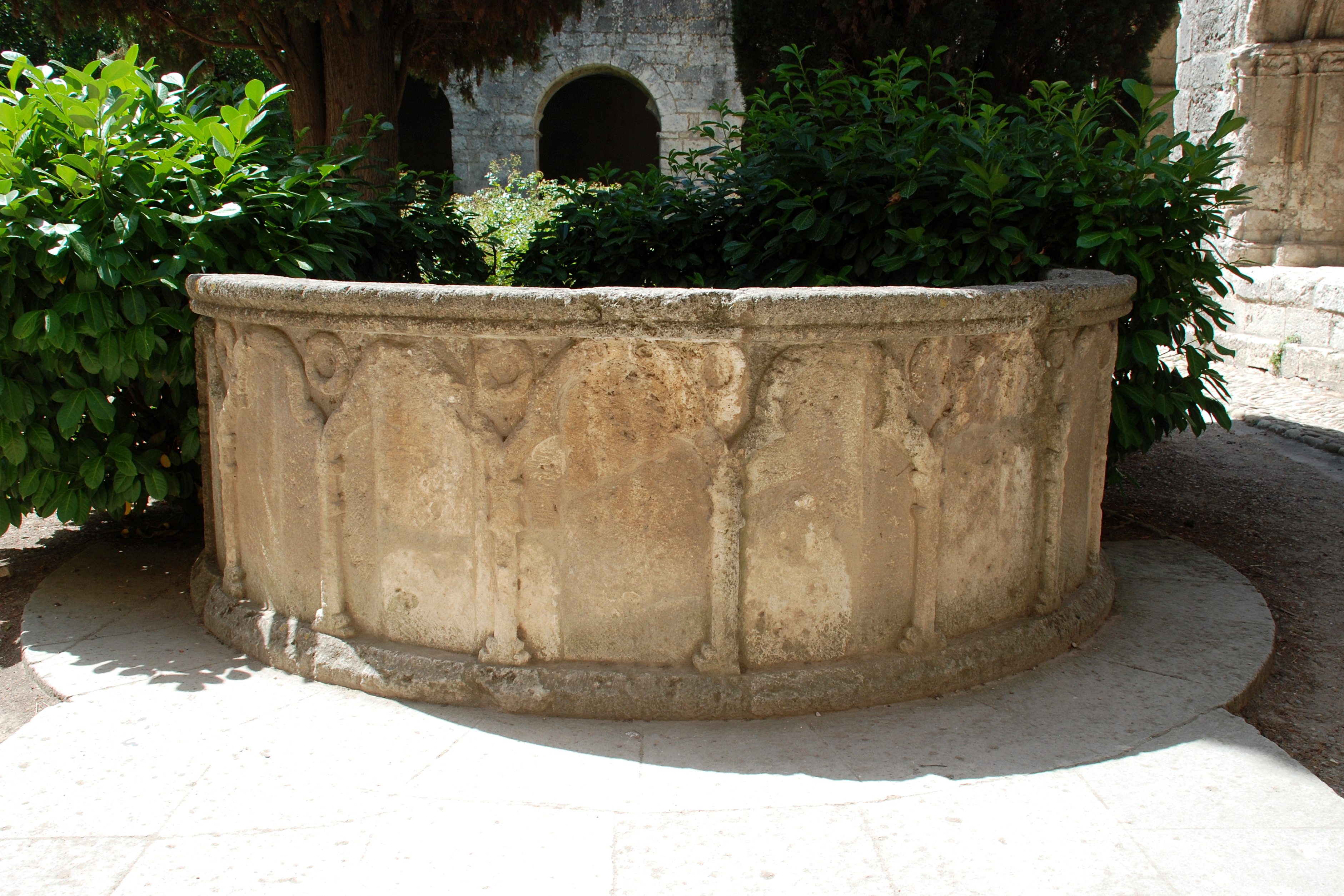 France - Provence - Abbaye de Silvacane